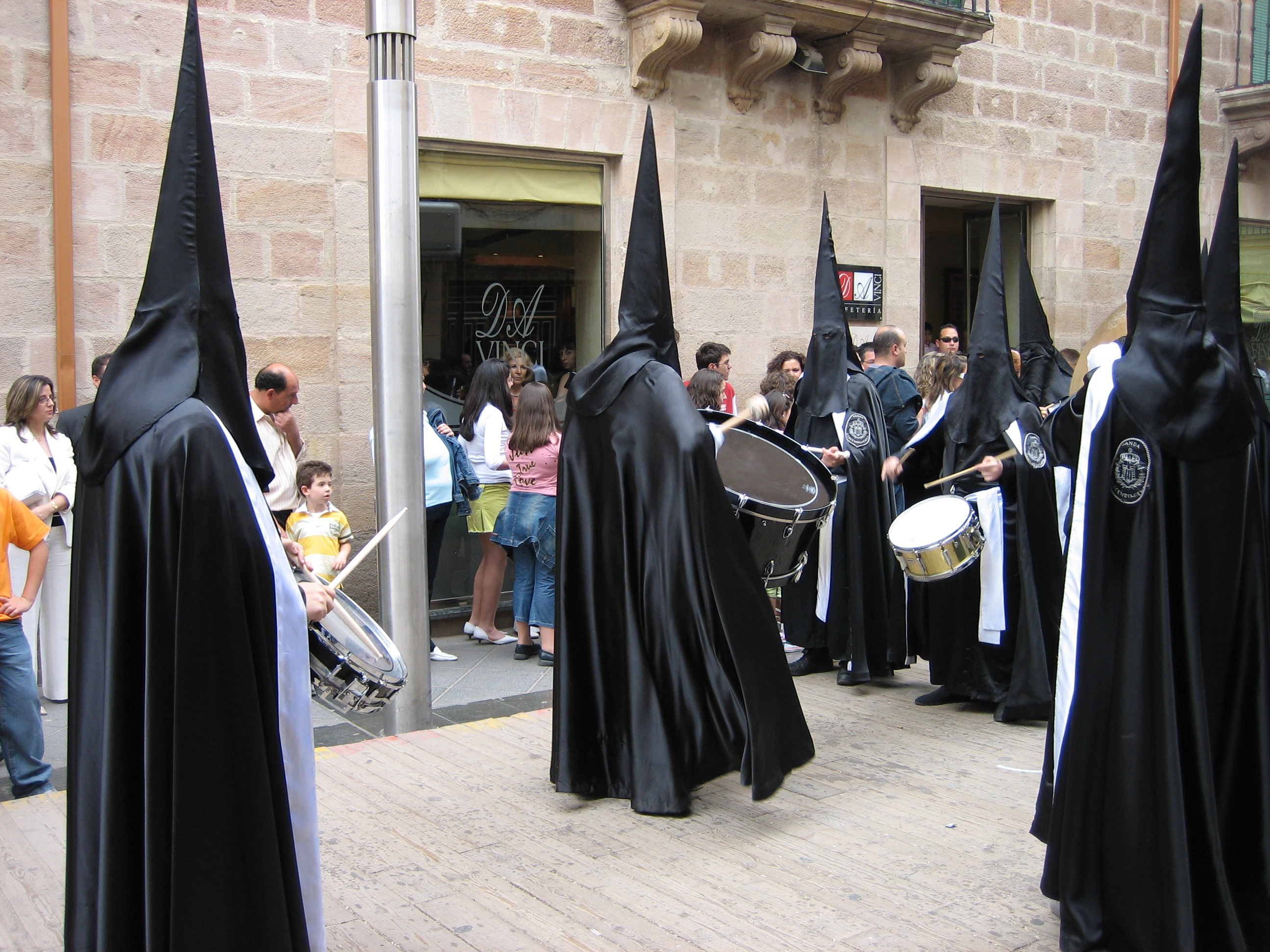 Banda de cabecera del Decendimiento Percusión de la banda de cabcera del Descendimiento